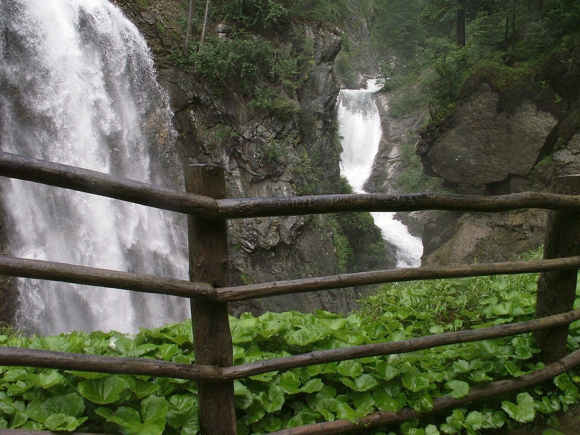 Reinbachfälle